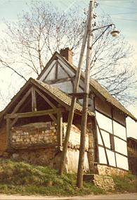 Limburgs: Bakkes mèt sjtaokhoes in Bómmerig